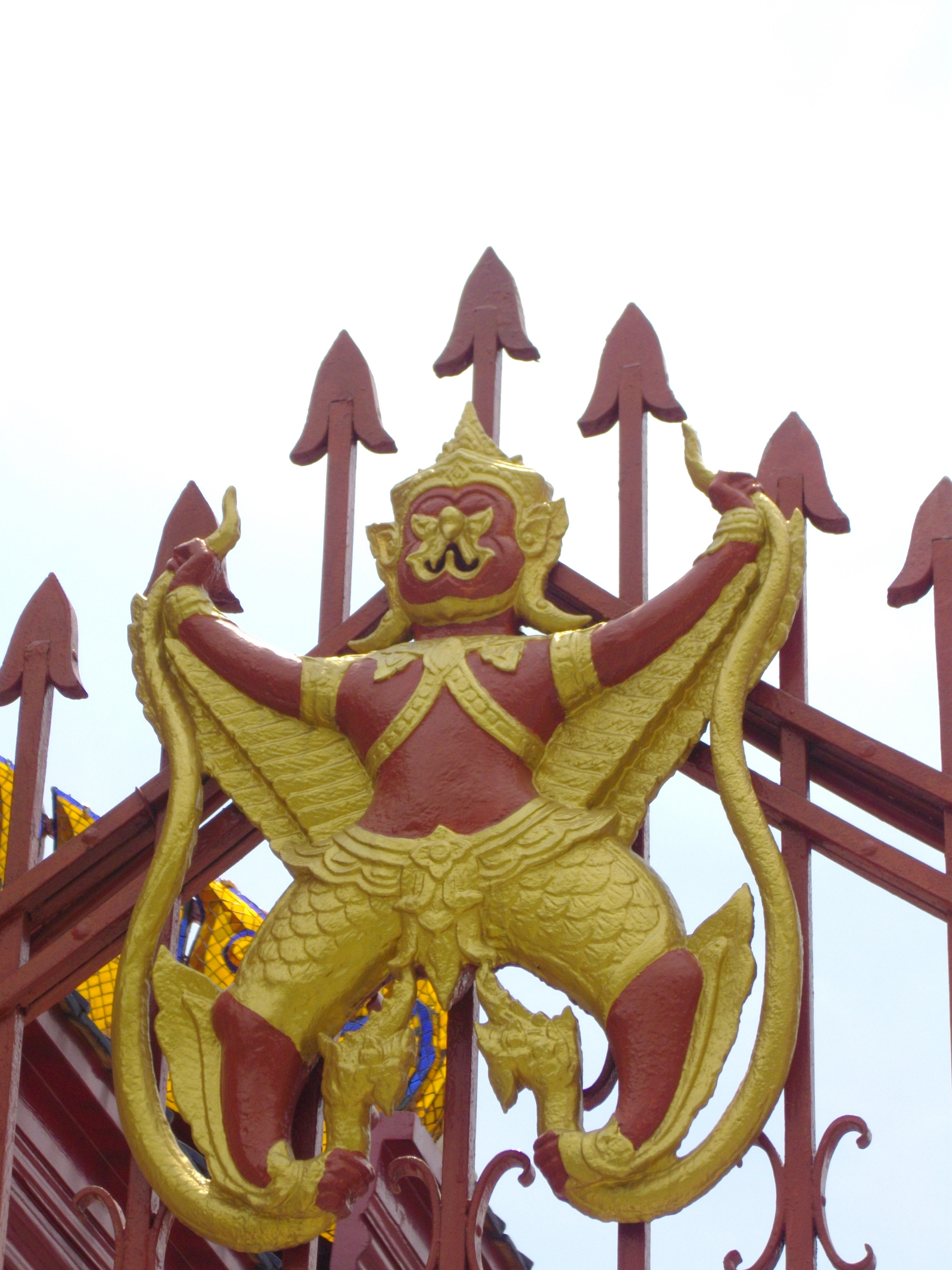 ตราพระราชลัญจกรประจำพระองค์พระบาทสมเด็จพระพุทธเลิศหล้านภาลัย (พระราชลัญจกรครุฑยุดนาค) ประดับรั้วเหล็กรอบบริเวณพระปรางค์วัดอรุณราชวราราม